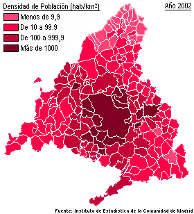 Map of population density of the Community of Madrid. Mapa de la densidad de población de la Comunidad de Madrid.